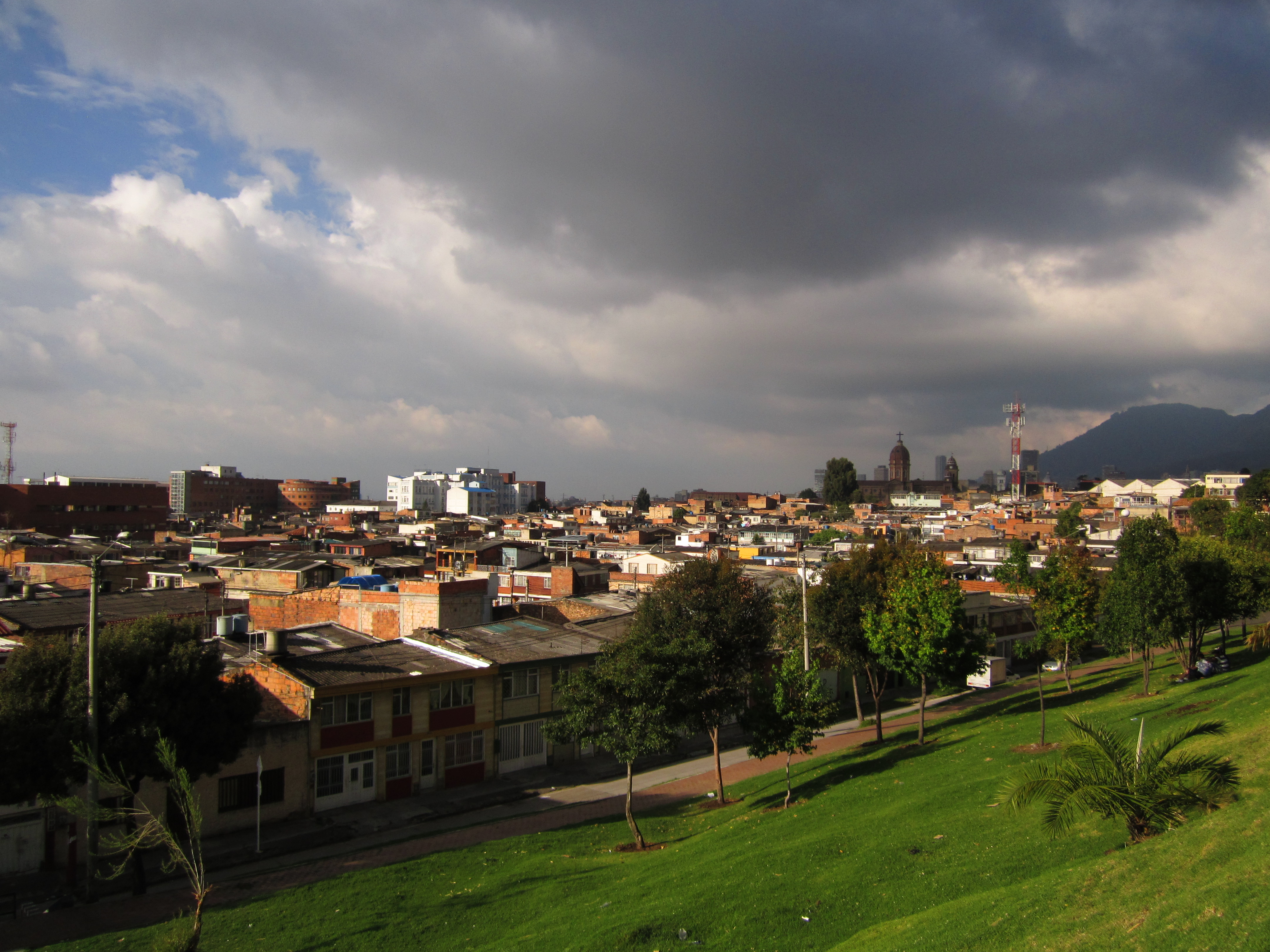 Barrio Calvo Sur parque en la Tr 7 bis cl 3 Sur - Bogotá